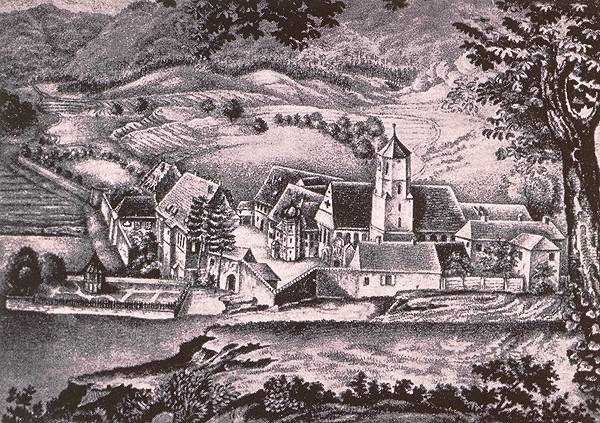 Ehemaliges Kloster Urspring (seit 1832 Baumwollweberei) im frühen 19. Jahrhundert, nach 1832/1833[1]